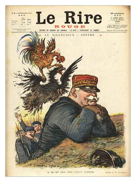 Titre : "Le Silencieux : Joffre" Légende : Il ne dit rien, mais chacun l'entend. Caricature from "Le Rire" by Charles Léandre : "Le Silencieux : Joffre" ("Joffre the Silent")